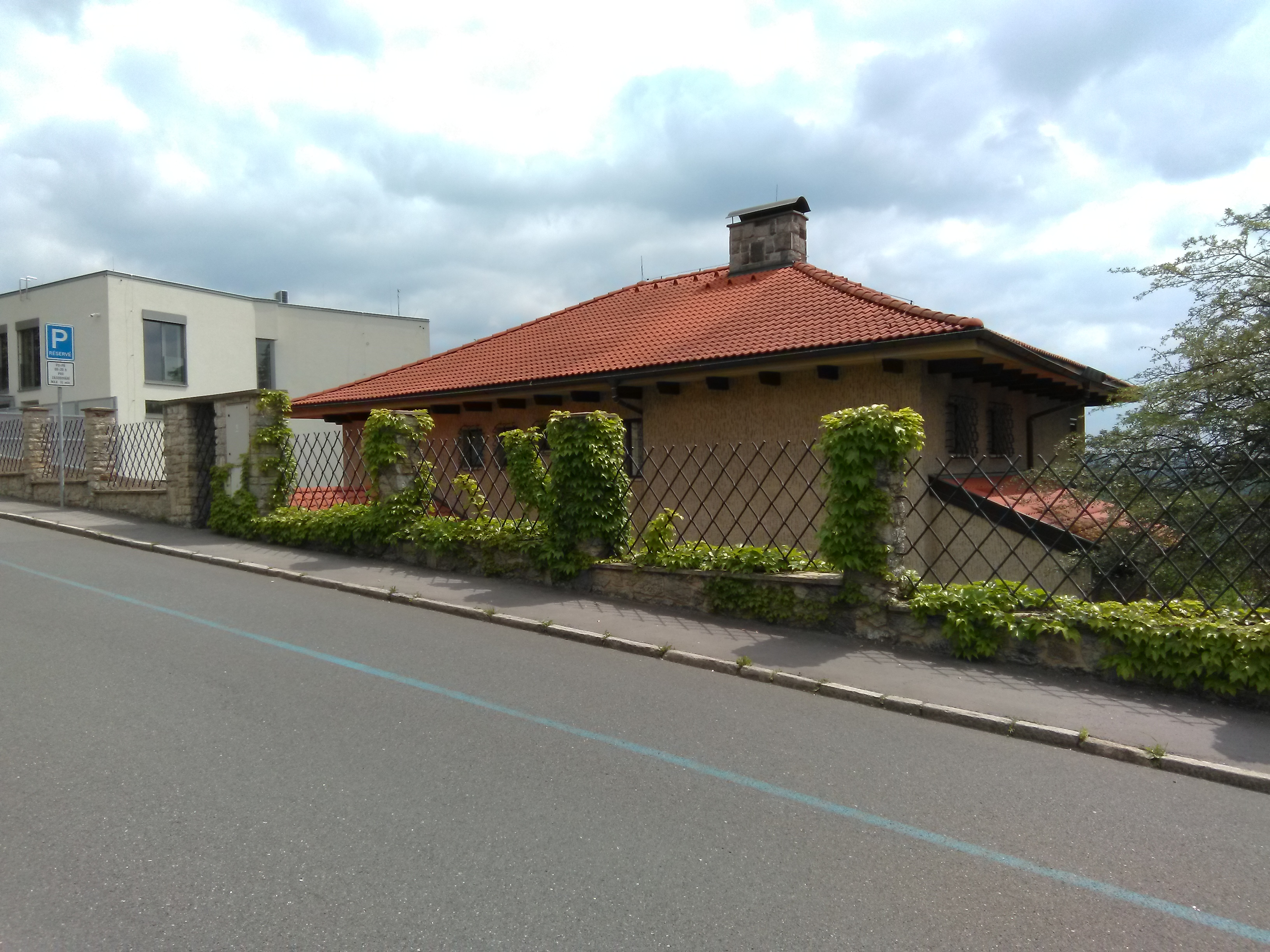 Barrandovská 437/54, Praha 5-Hlubočepy